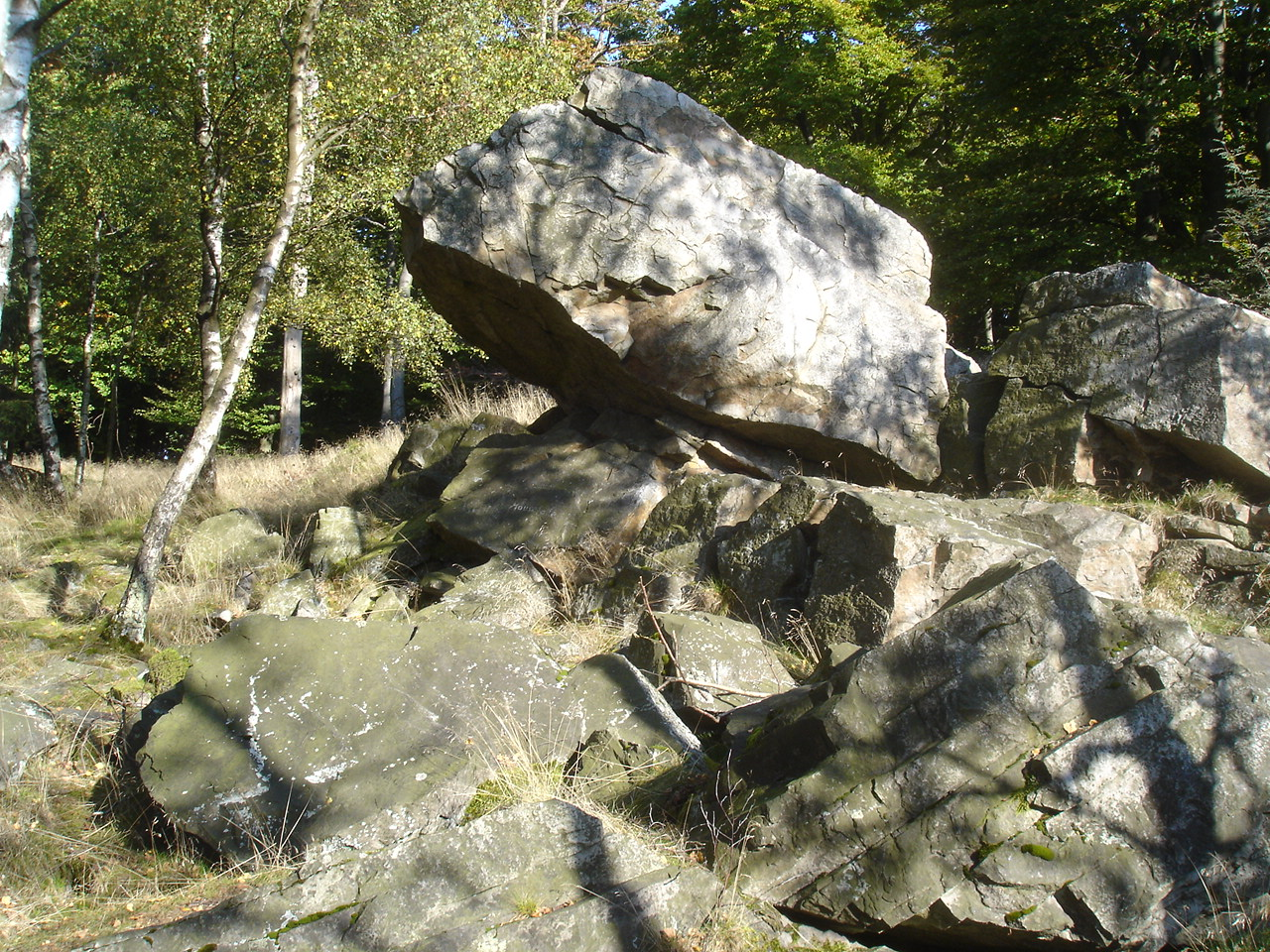 Die "Mausefalle" am Wüstegarten